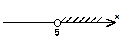 x ir lielāks nekā 5